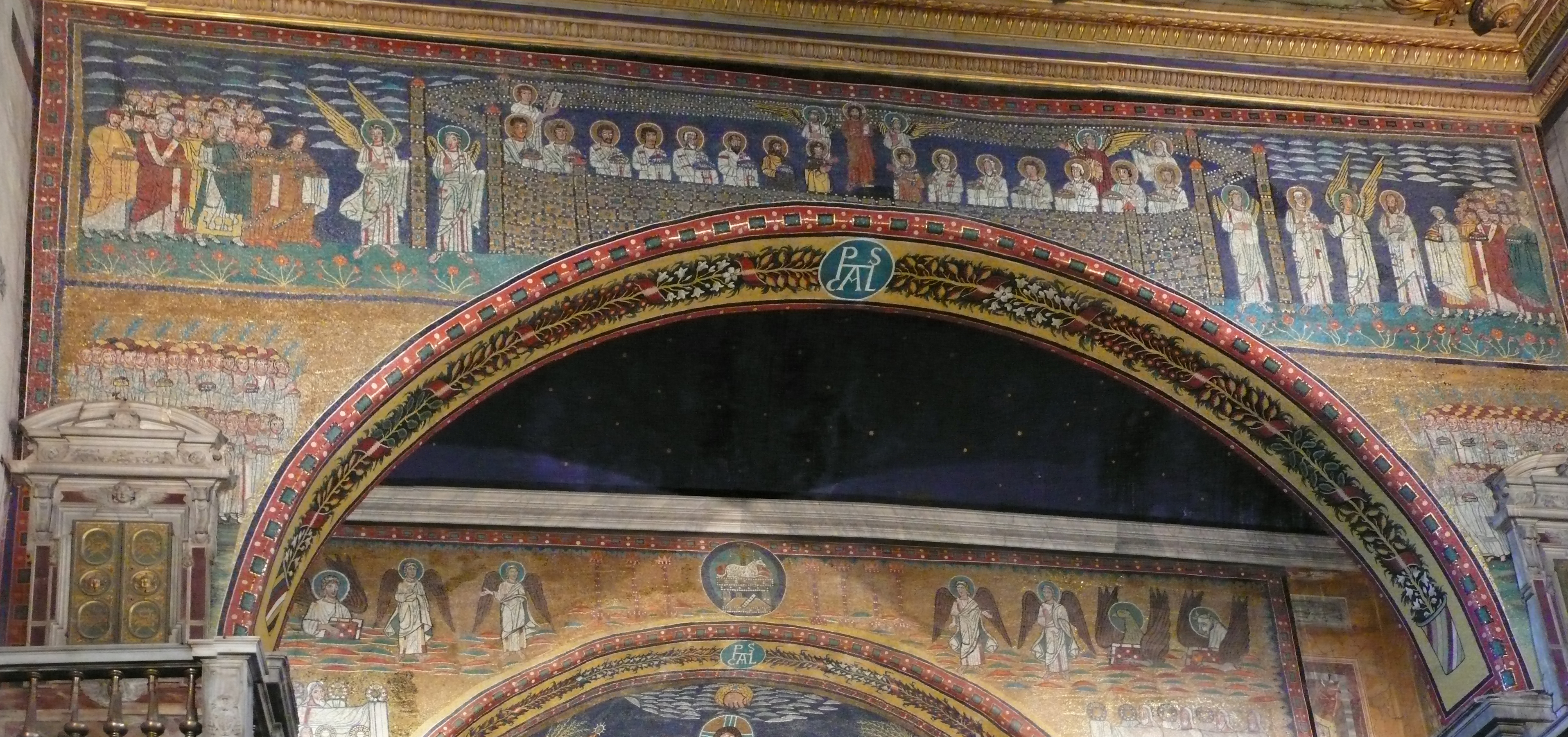 Santa Prassede, Rom; Triumphbogen (Panorama)